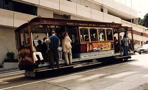 San Francisco Trolley; Eigen foto categorie:Afbeelding tram